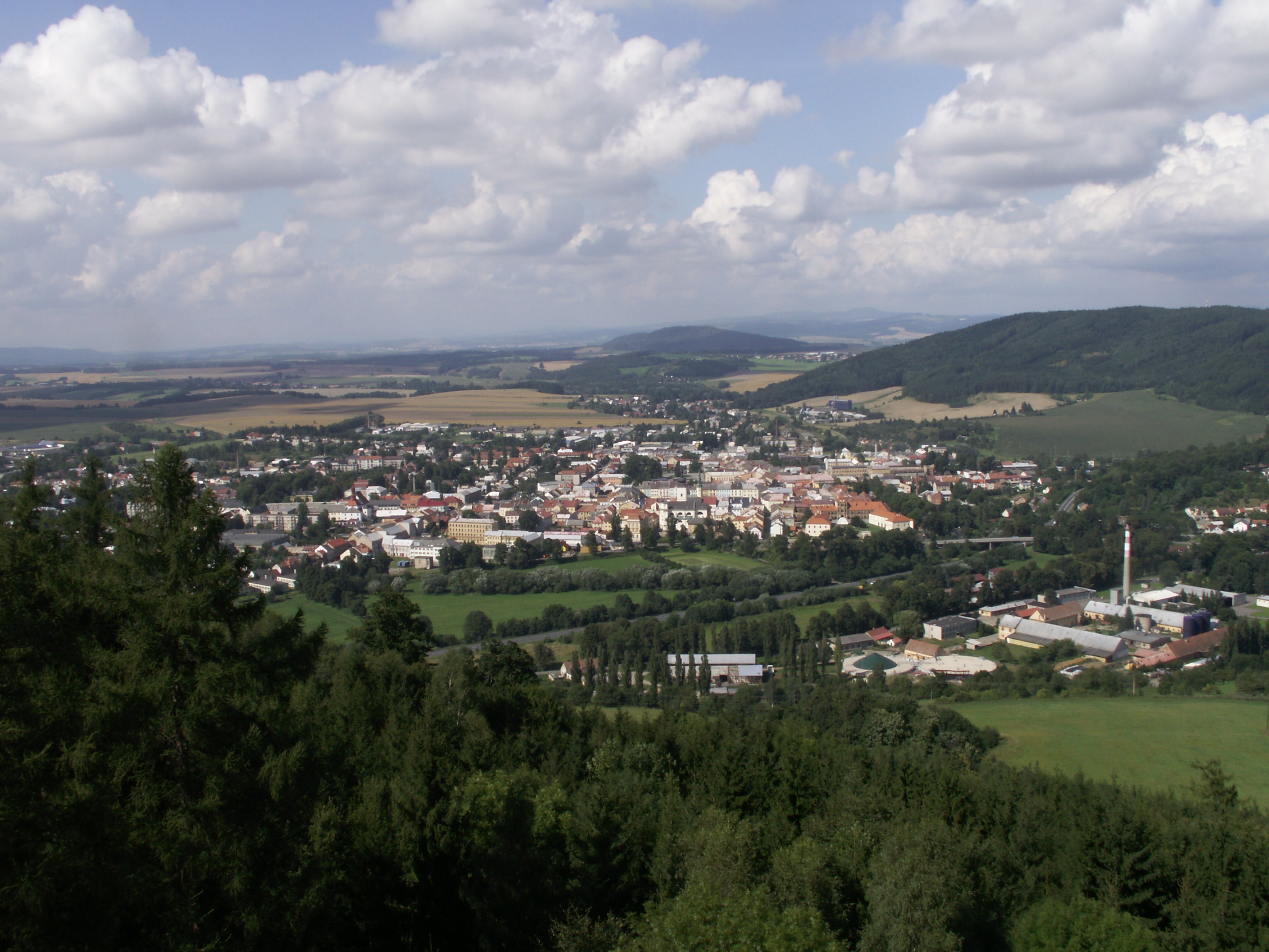 Pohled na Moravskou Třebovou z rozhledny Pastýřka